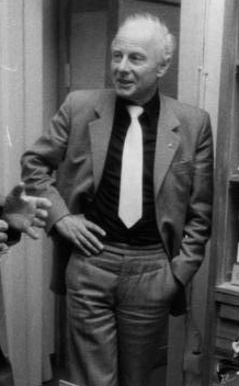 Berlin, David Silberstein, Franz Loeser ADN-ZB Rehfeld 14.4.81 Berlin: X. Parteitag Die Delegation der Kommunistischen Partei der USA, die zum X. Parteitag der SED in der DDR weilt, besuchte das Paul Robeson-Archiv der Akademie der Künste der DDR. Der Vorsitzende des Paul-Robeson-Archivs der DDR, Prof. Franz Loeser, informierte das Mitglied der Delegation, David Silberstein über die Arbeit des Archivs Abgebildete Personen: Loeser, Franz Prof. Dr.: Friedensrat, Vorsitzender des Paul-Robeson-Komitees, DDR GND 118573888